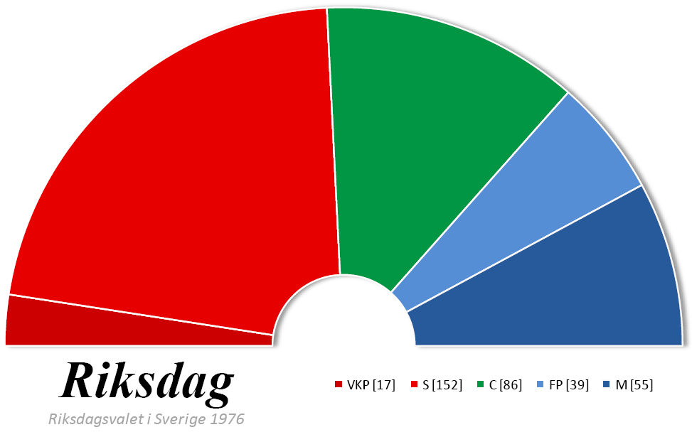 Composition du Riksdag suédois après les élections générales de 1976